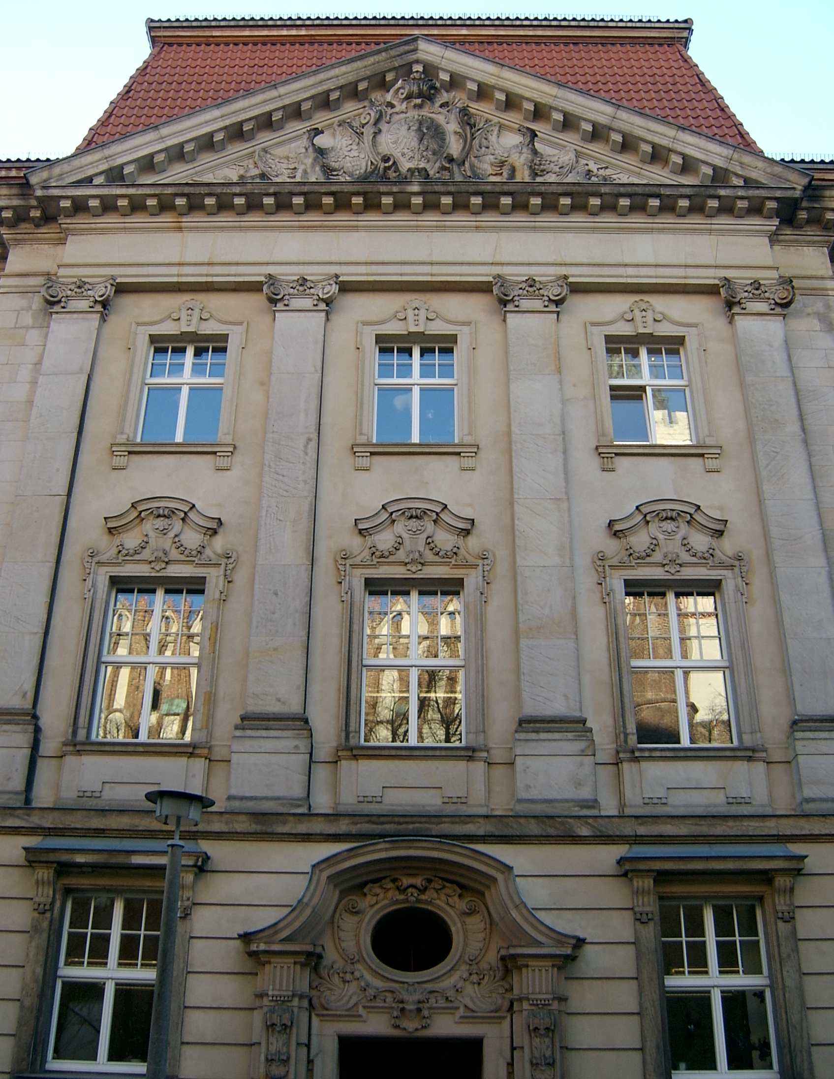 Gebäudeansicht des Hauptgebäudes der Europauniversität Viadrina in Frankfurt (Oder) von der Nordseite (Regierungsstraße) date: january 2006